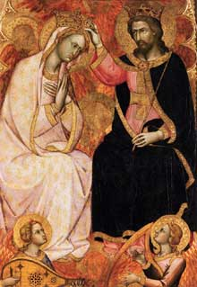 Peinture d'Andrea Utili Peintre Italien